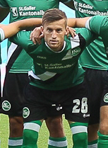 Ermir Lenjani en 2013